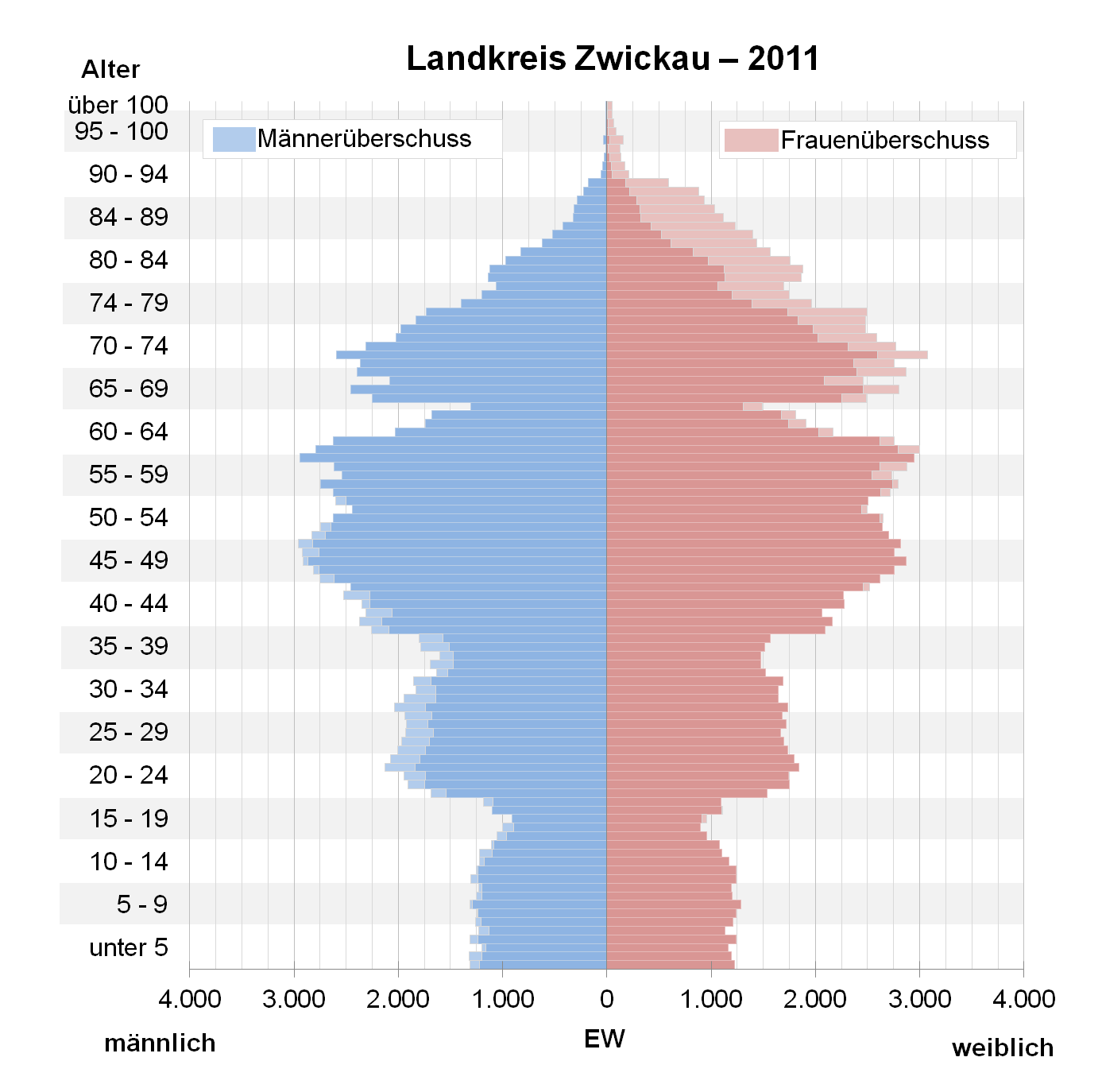 Bevölkerungspyramide des Landkreises Zwickau nach Zensus 2011.